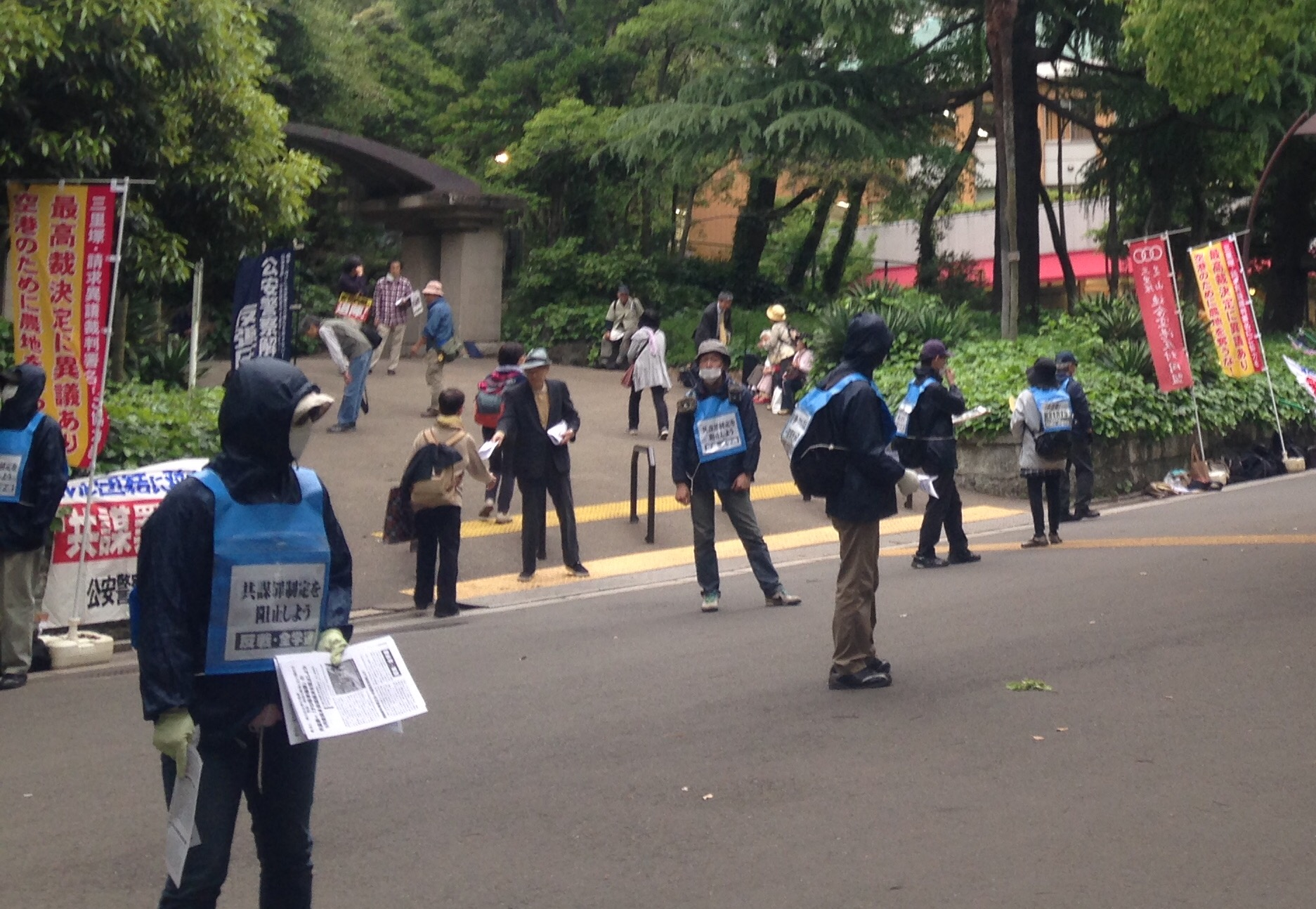 ビラを配布する現代社派（解放派主流派）全学連の活動家